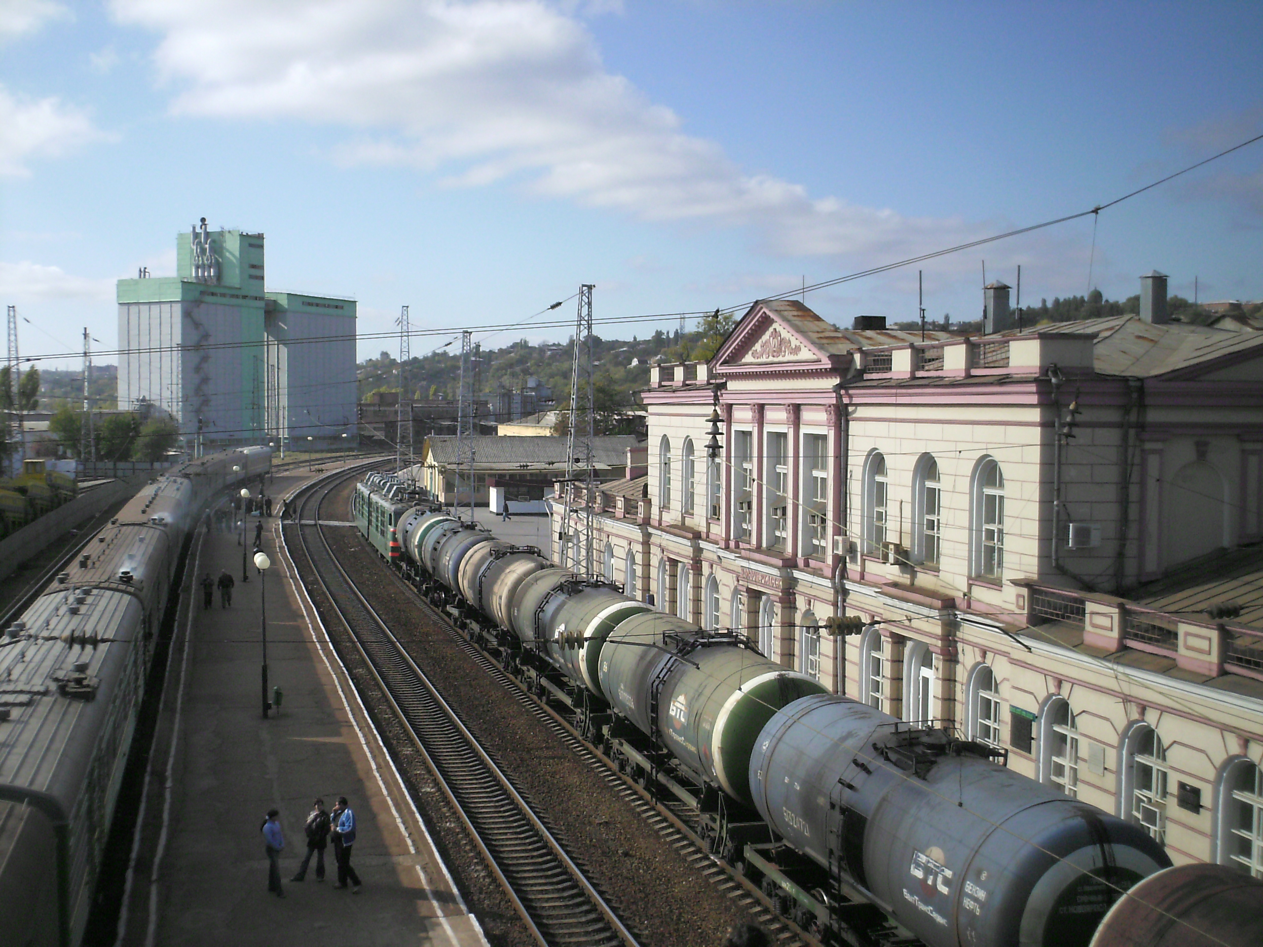 в Новочеркасске